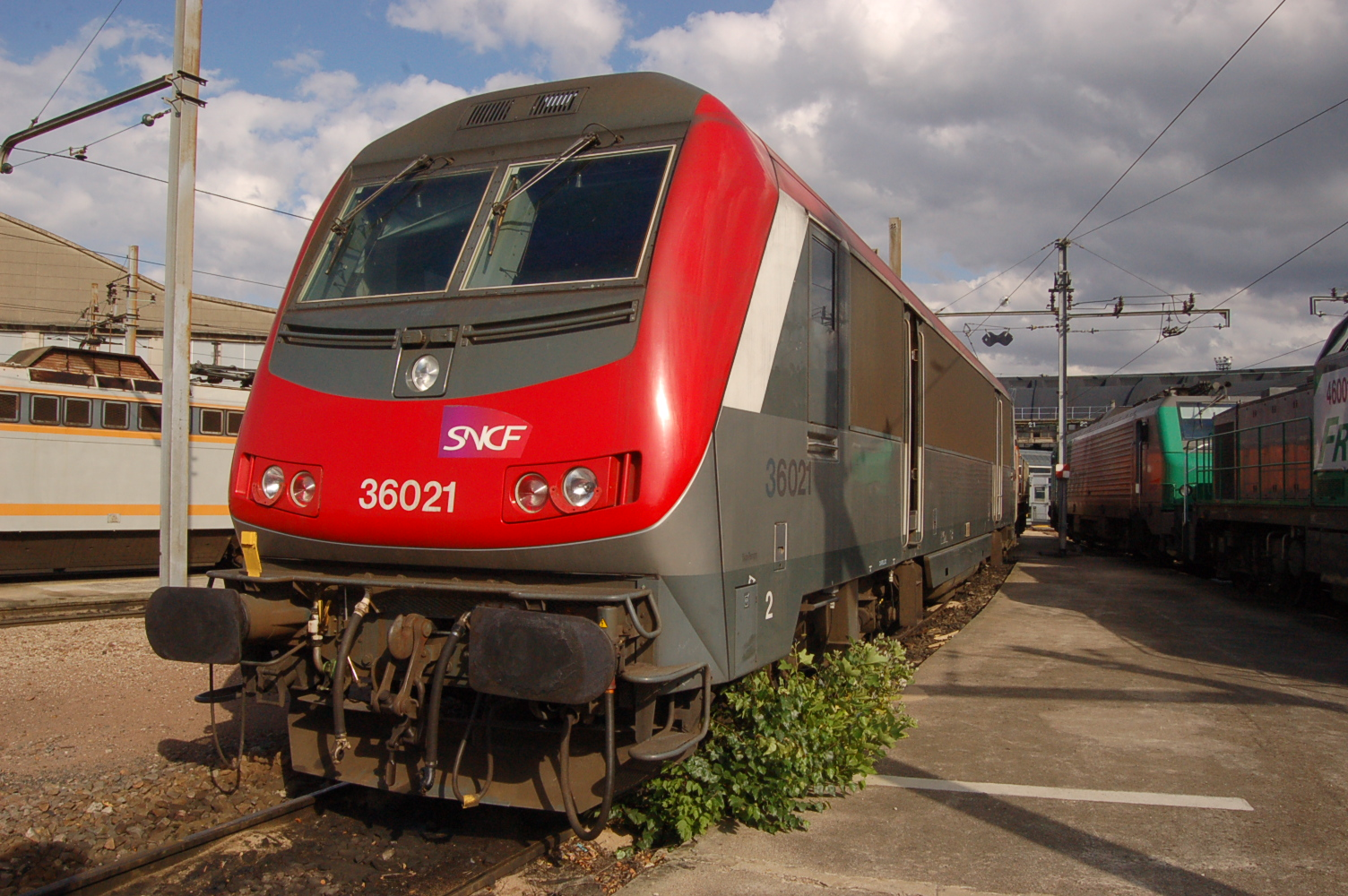 La 36021 au dépôt de Villeneuve Saint Georges (Val de Marne)